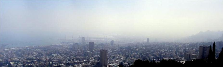 זיהום אויר במפרץ חיפה